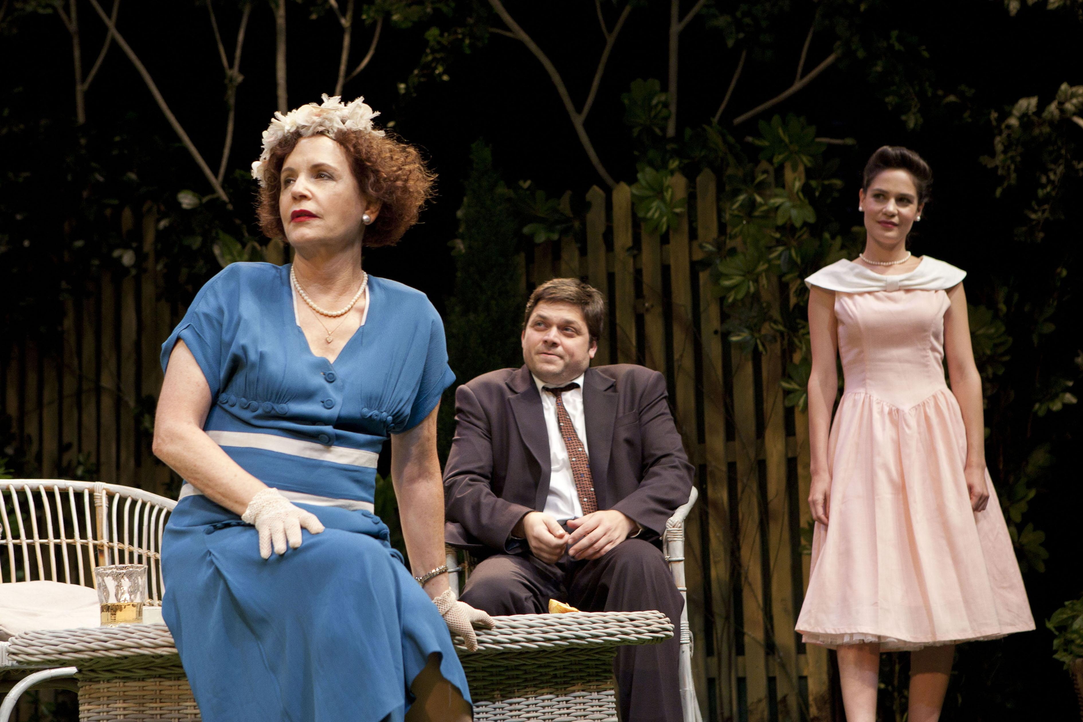 נטע גרטי, אוהד קנולר וליאורה ריבלין, בהצגה "כולם היו בניי" מאת ארתור מילר, בבימויו של משה נאור, קופרודוקציה של תיאטראות הקאמרי וחיפה, 2011